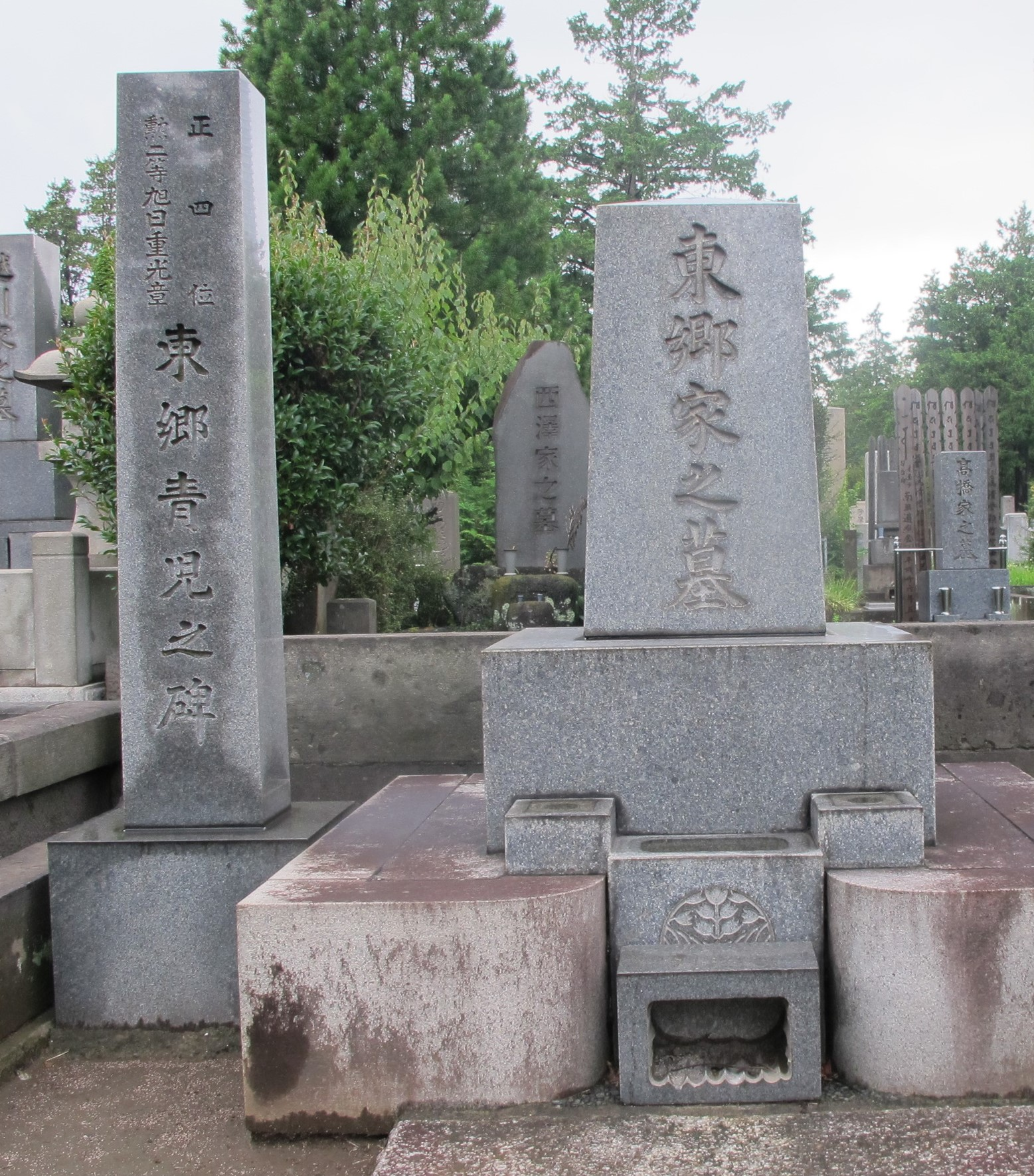 Grave of Seiji Togo